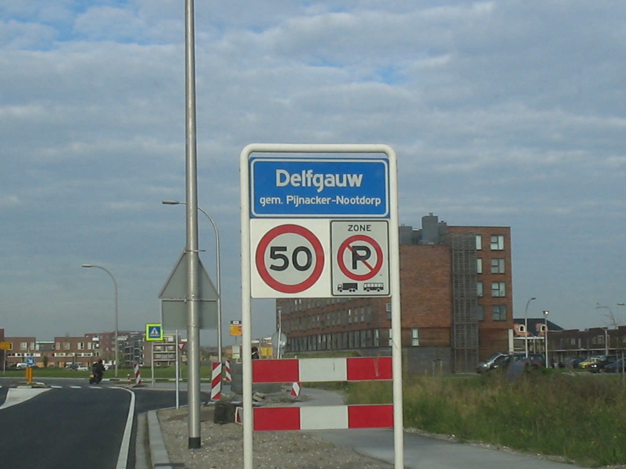 Bord Delfgauw, 8 november 2005